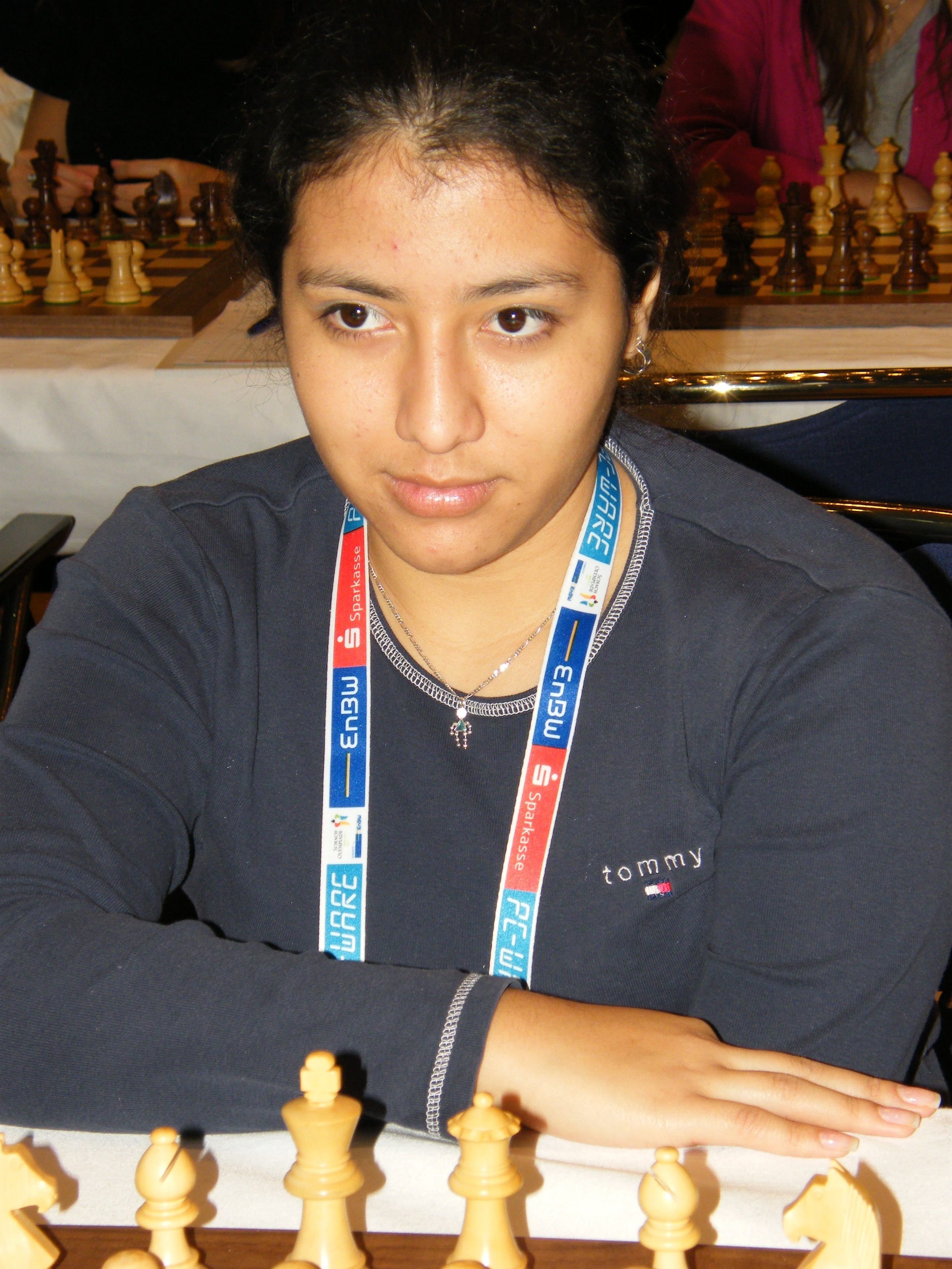 Claudia Mencos bei der 38. Schacholympiade in Dresden 2008